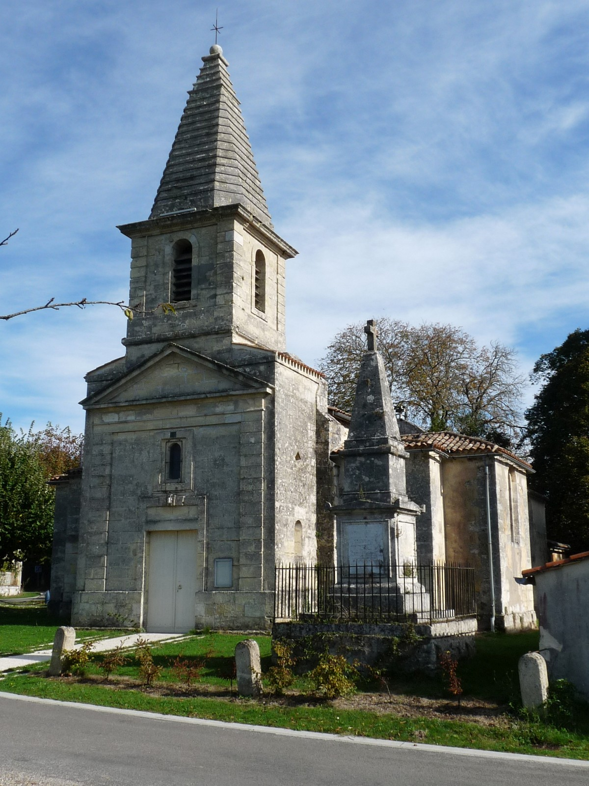 Eglise et tombeau, Comps, Gironde, France